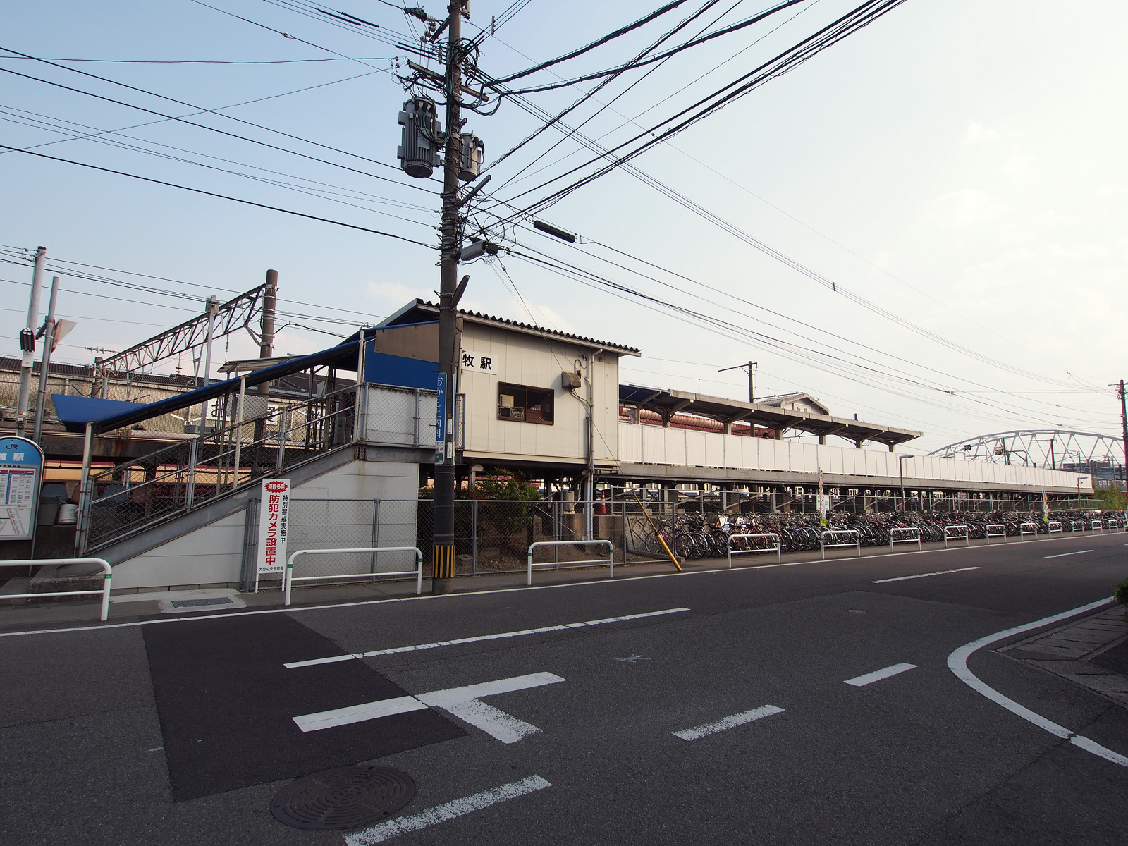 JR牧駅（大分県大分市）